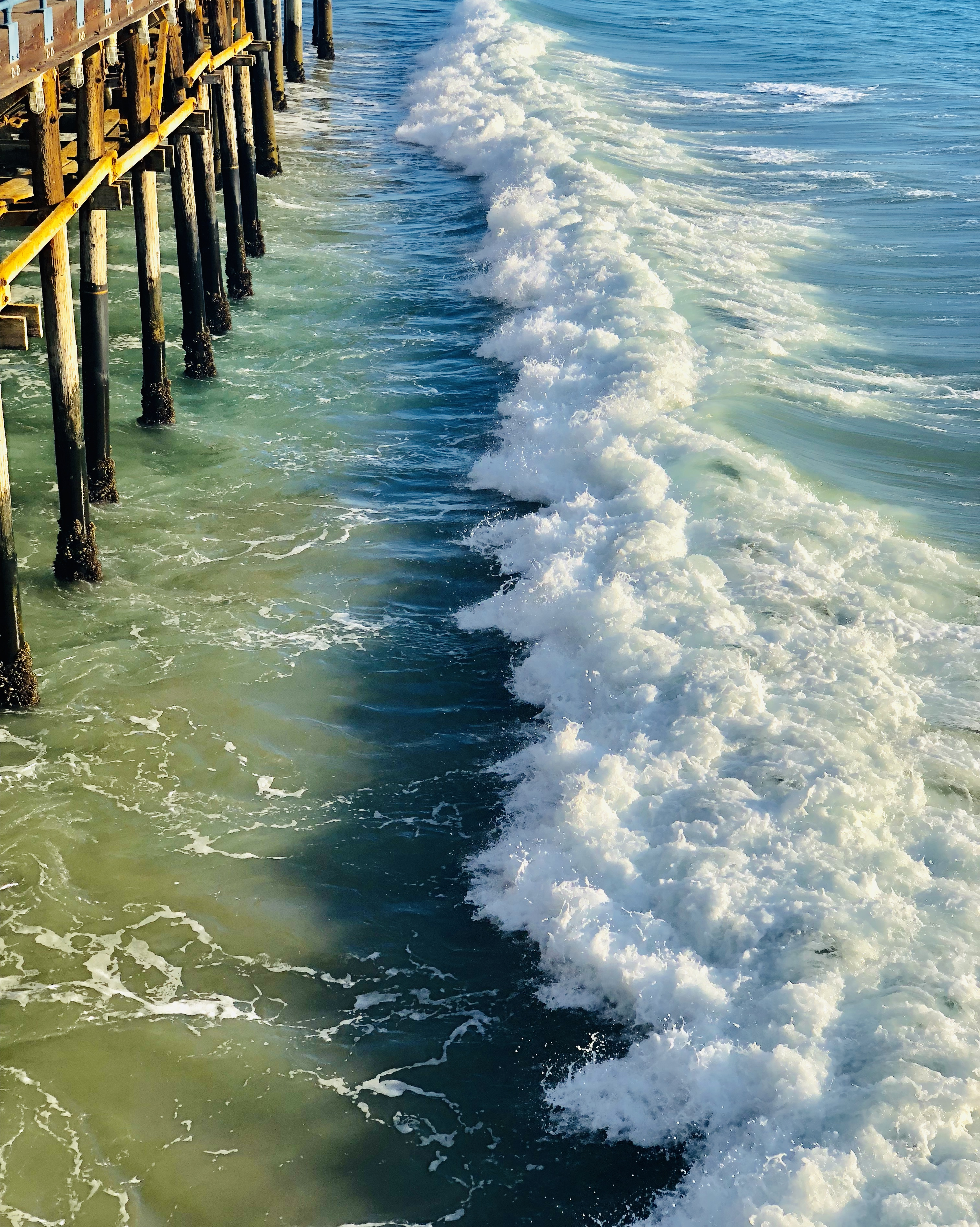 امواج زبدة البحر